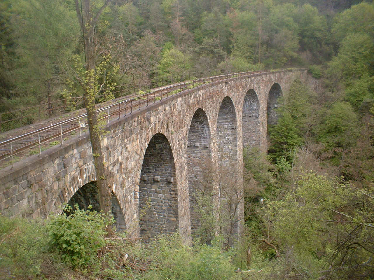 Žampach viaduct